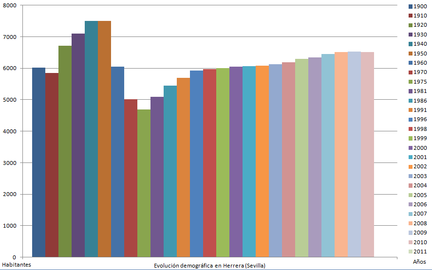 Gráfico que muestra la evolución demográfica de Herrera (Sevilla)